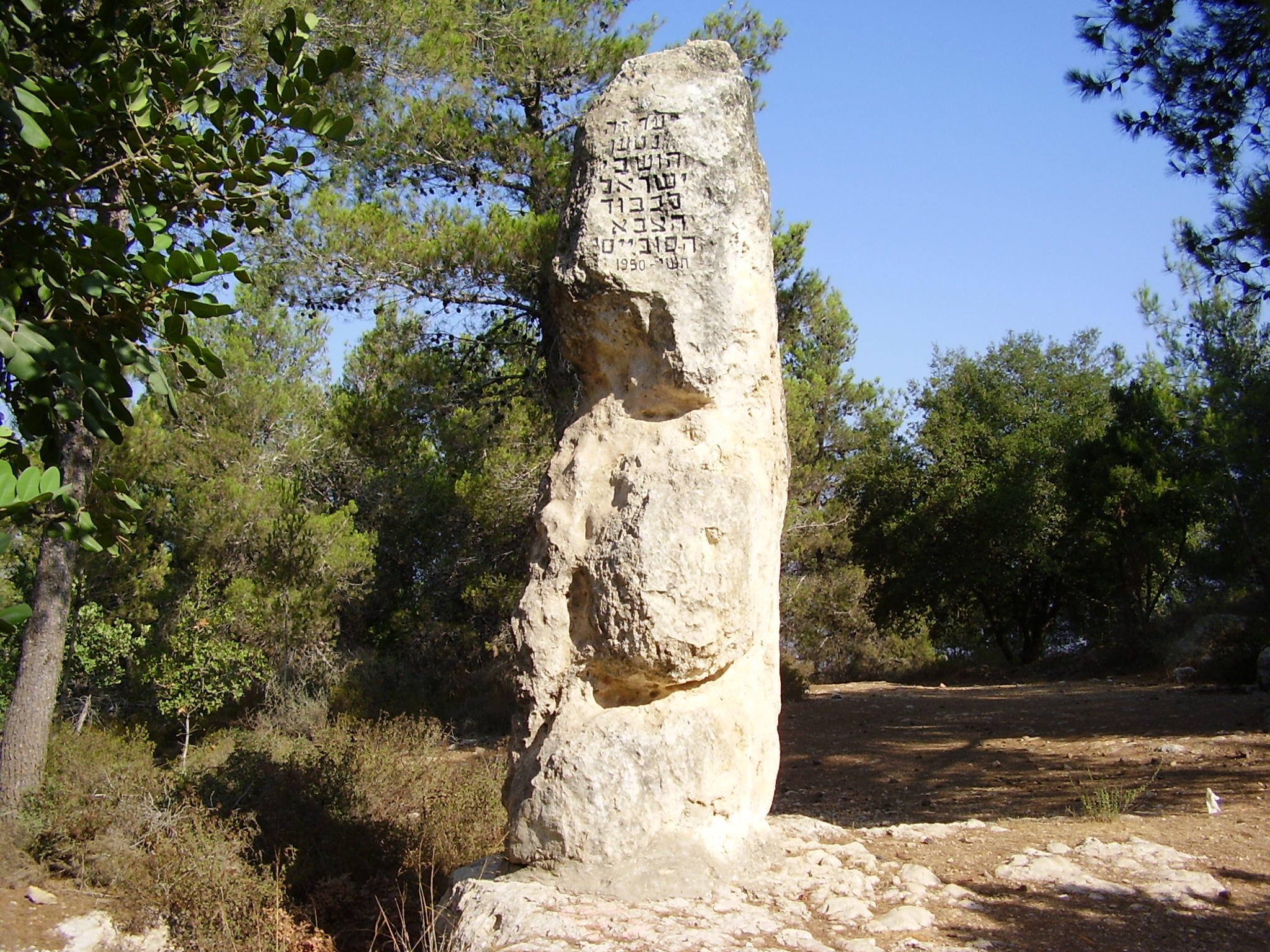 סלע הקדשה לצבא הסובייטי ביער הצבא האדום בהר הרוח.